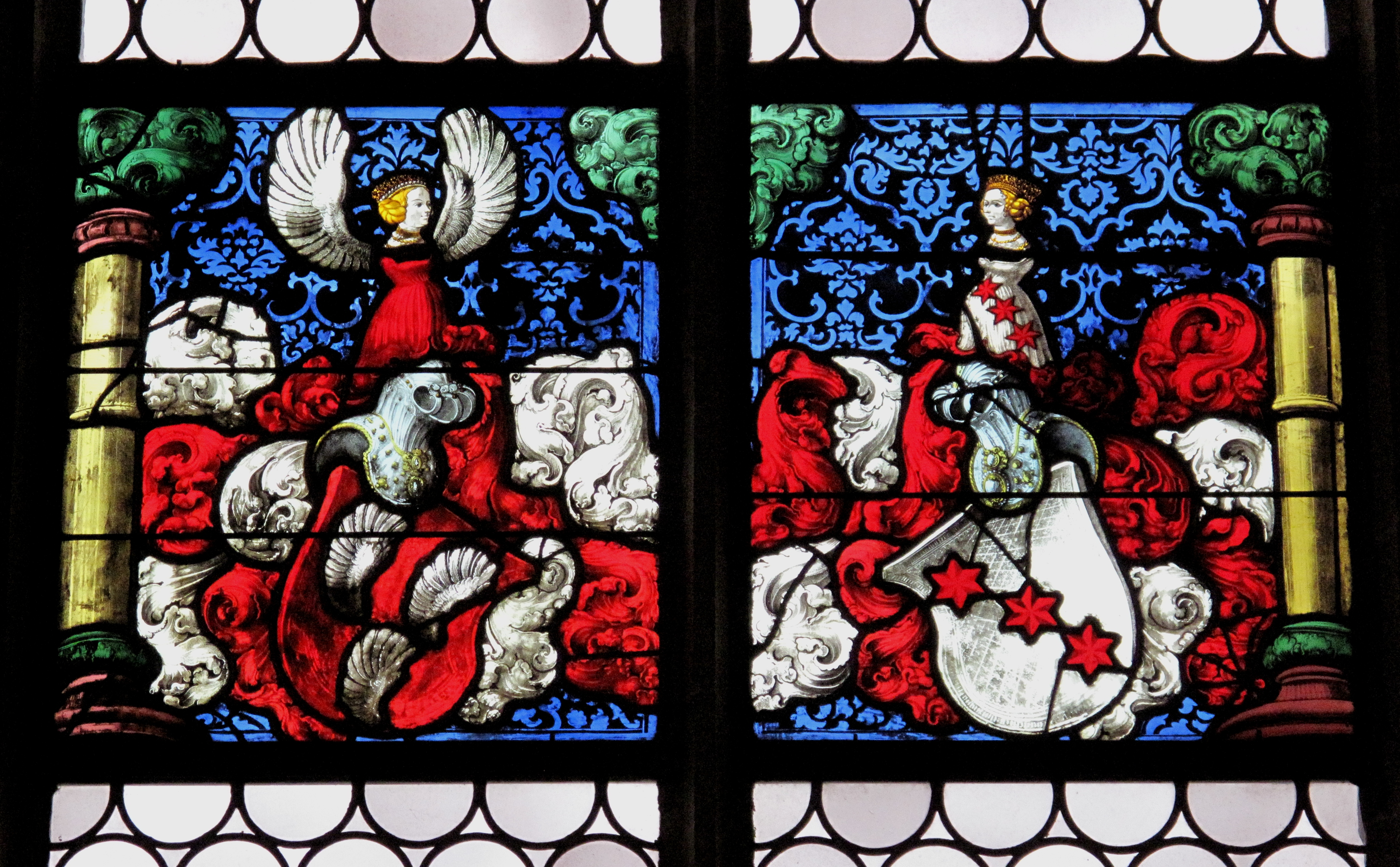 Kirche Ligerz, Wappenallianz Jakob von Wattenwyl (1466-1525), Schultheiss von Bern, Herr zu Burgistein, Wattenwil, Kirchdorf, Gerzensee, Blumenstein, Schönegg und Seftigen, und Magdalena von Muhlern († 1513).